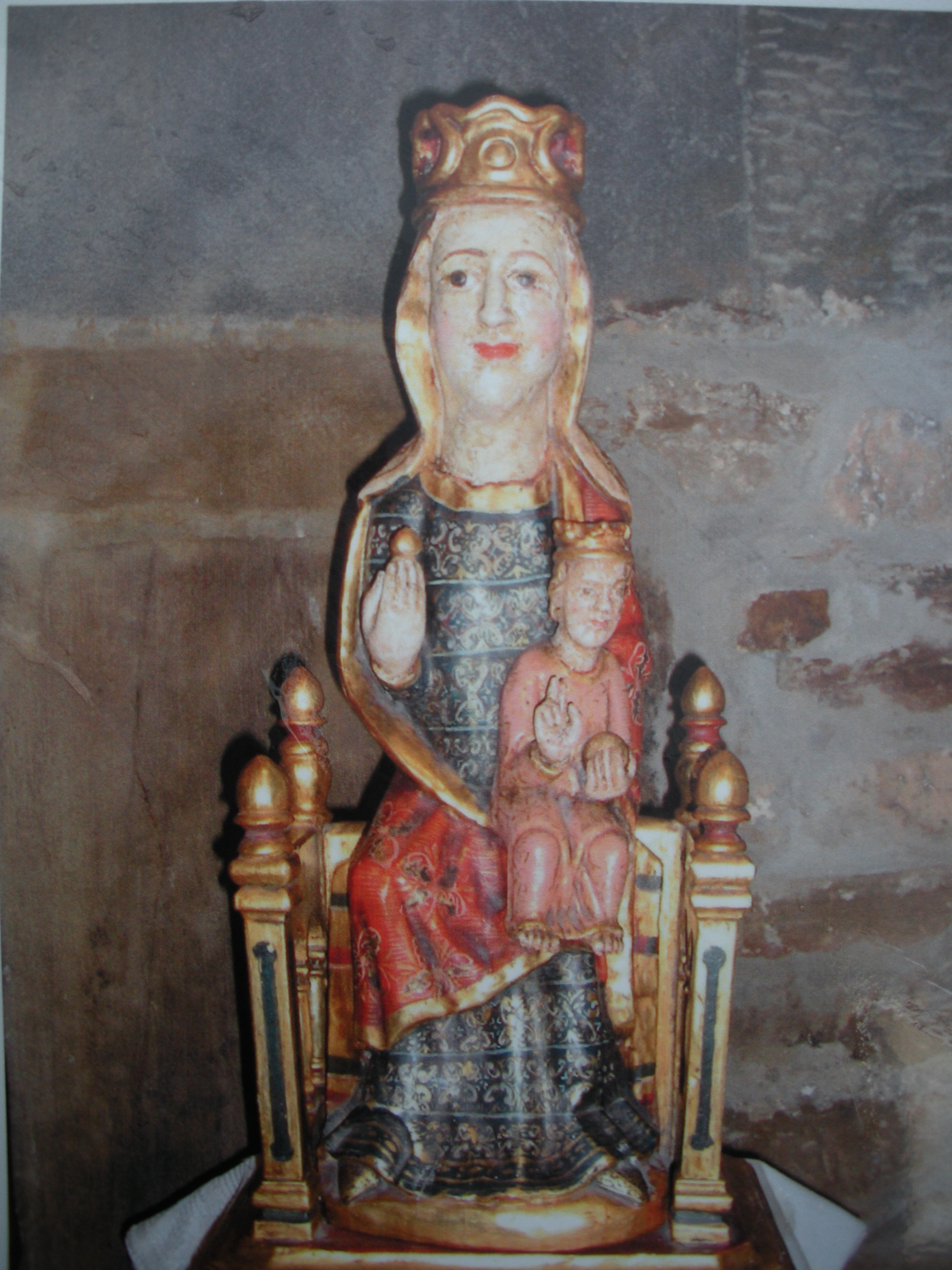 Imagen de la Virgen de Areños, patrona de Velilla del Río Carrión (Palencia), España.